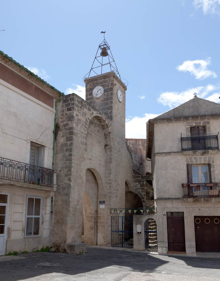 Une vue de Pouzols (Hérault).